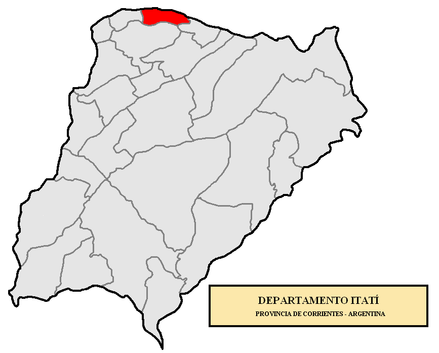 Localización del Departamento Itatí en la provincia de Corrientes, Argentina Localización del Departamento Itatí, en la provincia de Corrientes, Argentina.